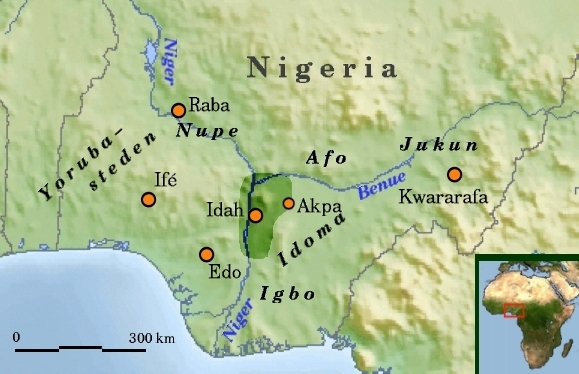 Historisch Igala in Nigeria, Nederlands